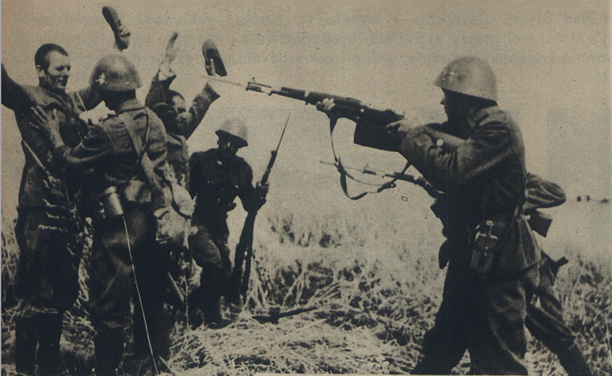 "Vpravo vidíme vojakov slovenskej armády na východnom fronte s ruskými vojakmi, ktorí sa Im museli vzdaf a v tej chvíli stali sa zajatcami, ktorých úžasné množstvá každým dňom pribúdajú."